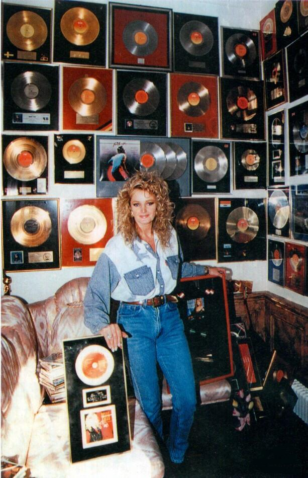 Bonnie Tyler az arany és platinalemezeivel 1993